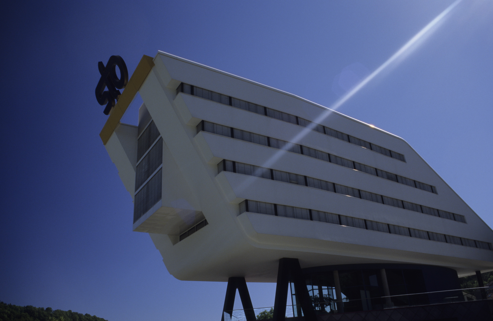 Hauptgebäude der Fa. Stotmeister in Stühlingen-Weizen, Landkreis Waldshut, Baden-Württemberg